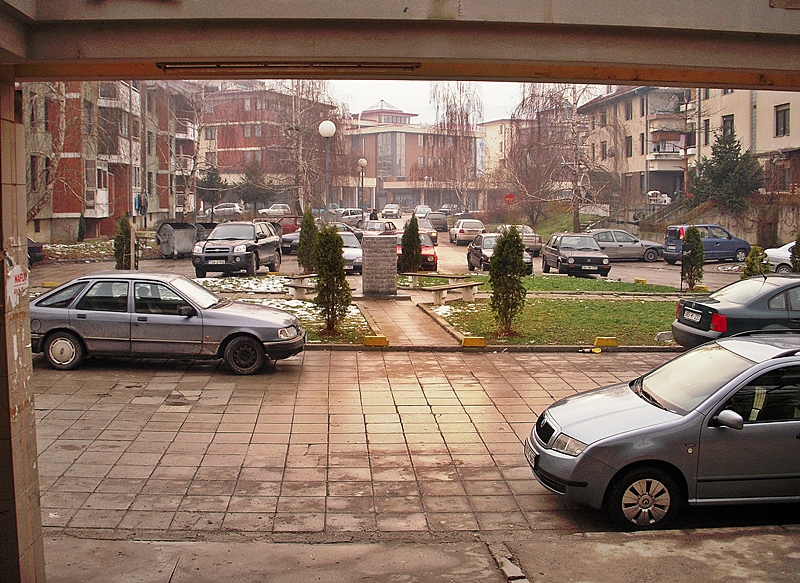 Dobrinja 4 Istočno Sarajevo